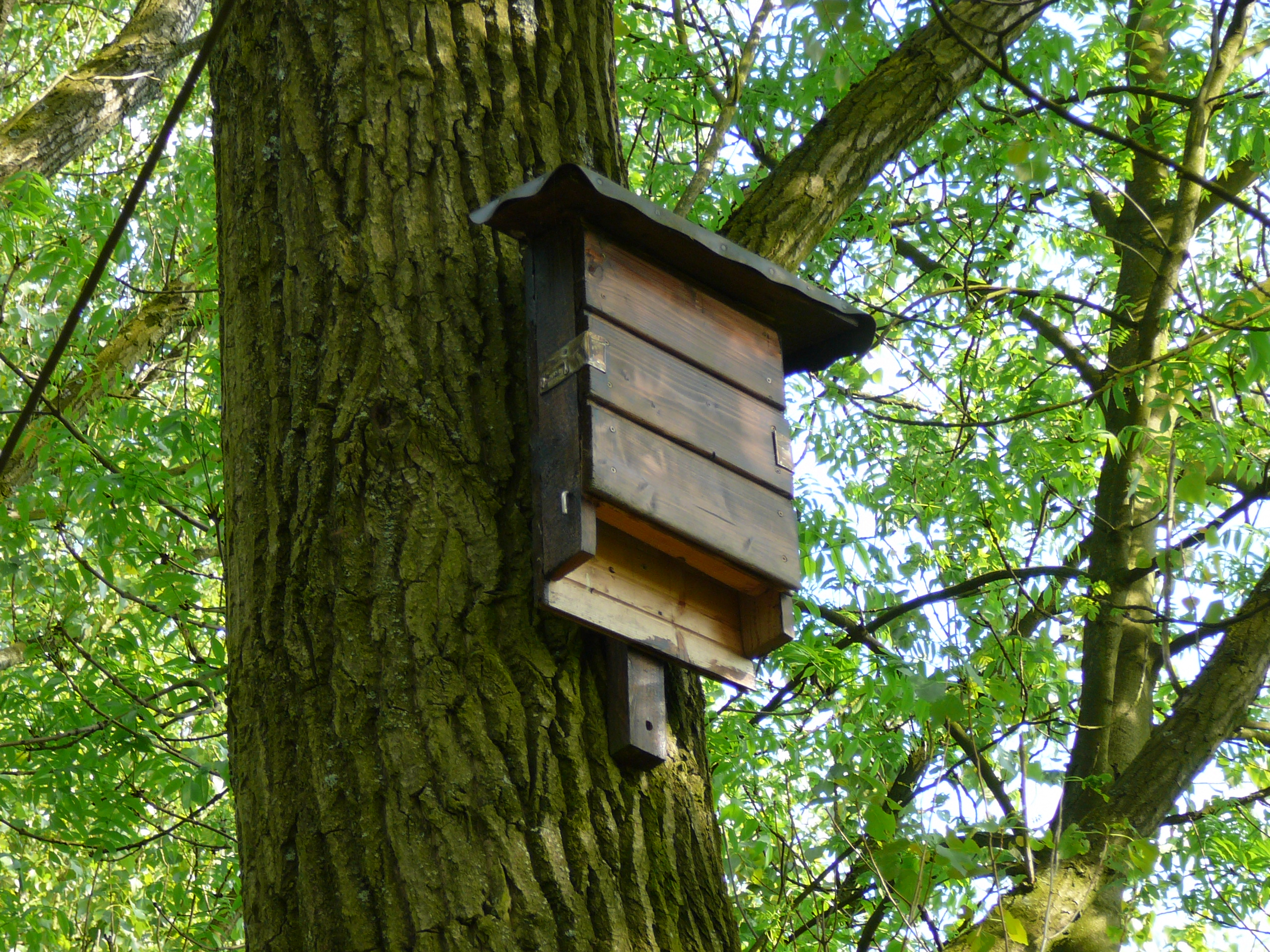 Fledermauskasten bei Haus Graven, Langenfeld (Rheinland).